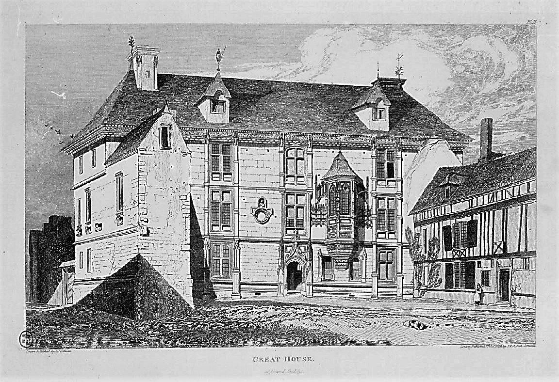 Manoir de Radeval vers 1818